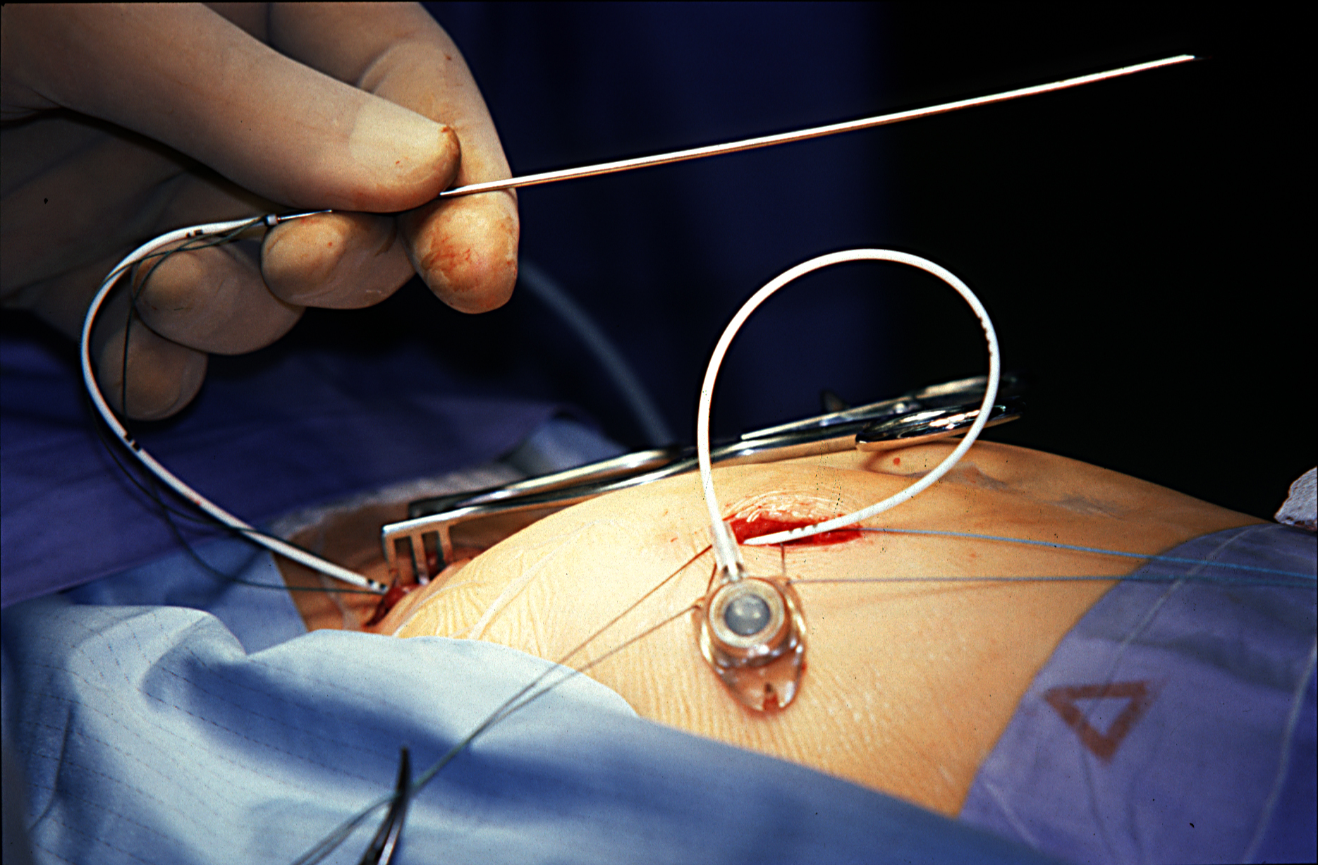 Das Bild zeigt die Anlage eines tunnellierten Portkatheters nach der Seldinger-Technik.